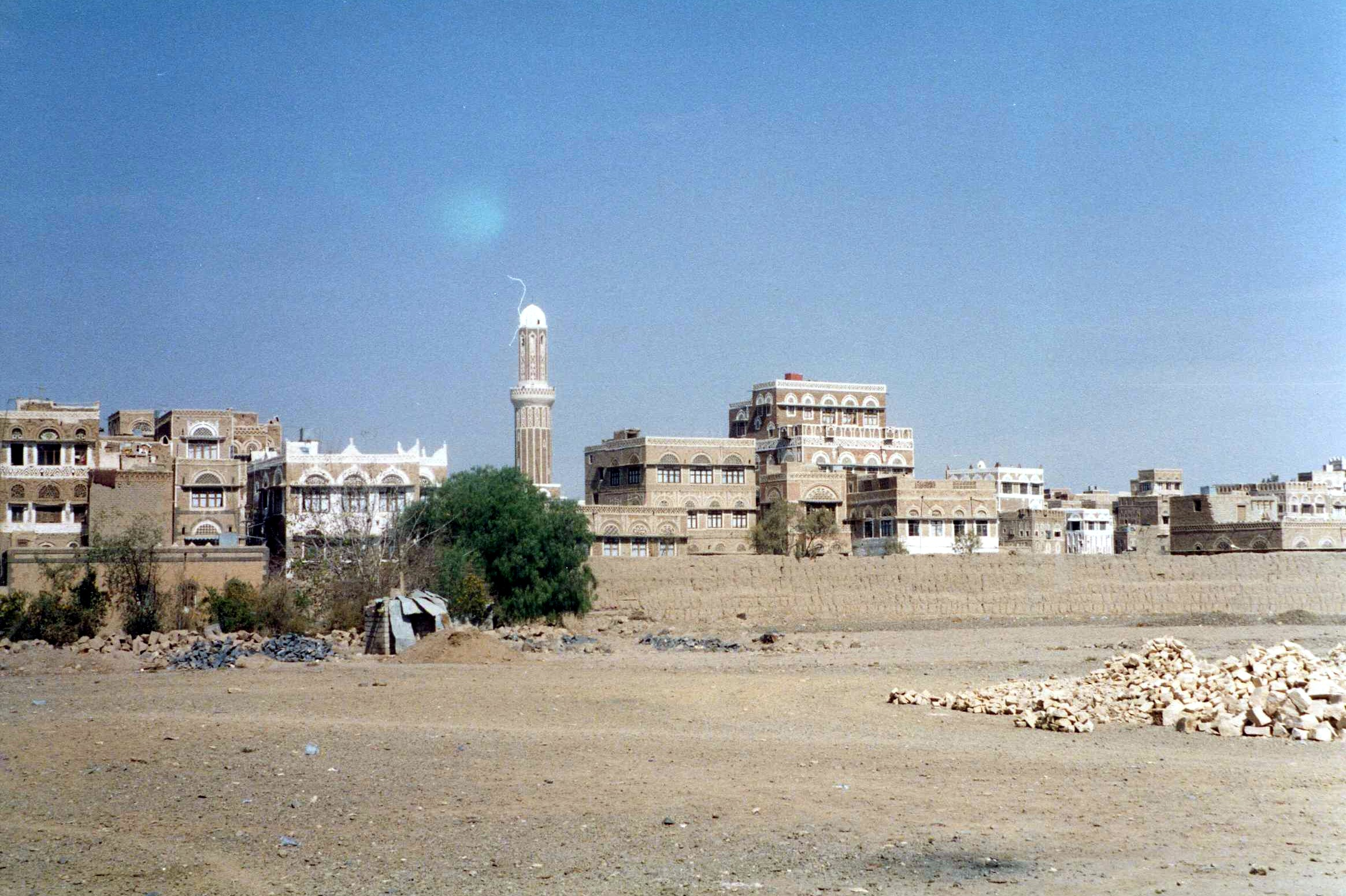 Sana'a